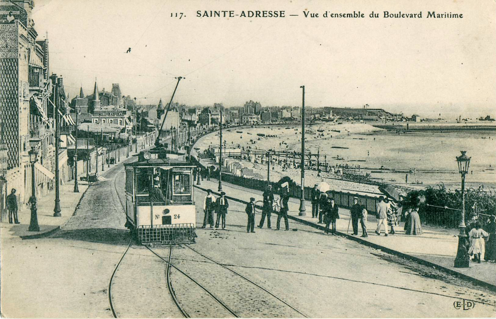 Carte postale ancienne éditée par ELD, n°117SAINTE-ADRESSE - Vue d'ensemble du Boulevard Maritime